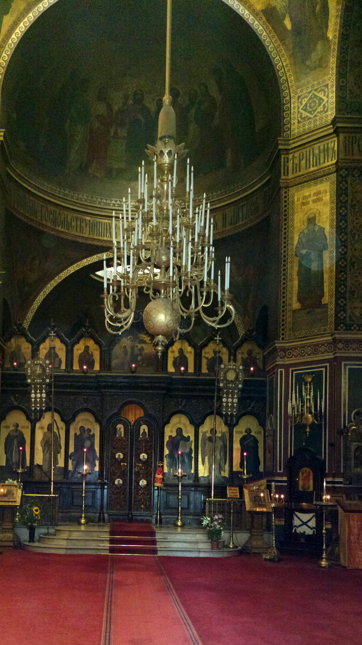 La cathédrale Saint-Alexandre-Nevsky est une église orthodoxe russe située à Paris, rue Daru (8e arrondissement). .